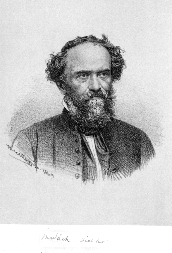 Sztregovai és kiskelecsényi Madách Imre (Alsósztregova, 1823. január 20. – Alsósztregova, 1864. október 5.) magyar költő, író, ügyvéd, politikus, a Kisfaludy Társaság rendes és a Magyar Tudományos Akadémia levelező tagja. A magyar irodalom és drámaköltészet kiemelkedő alakja.